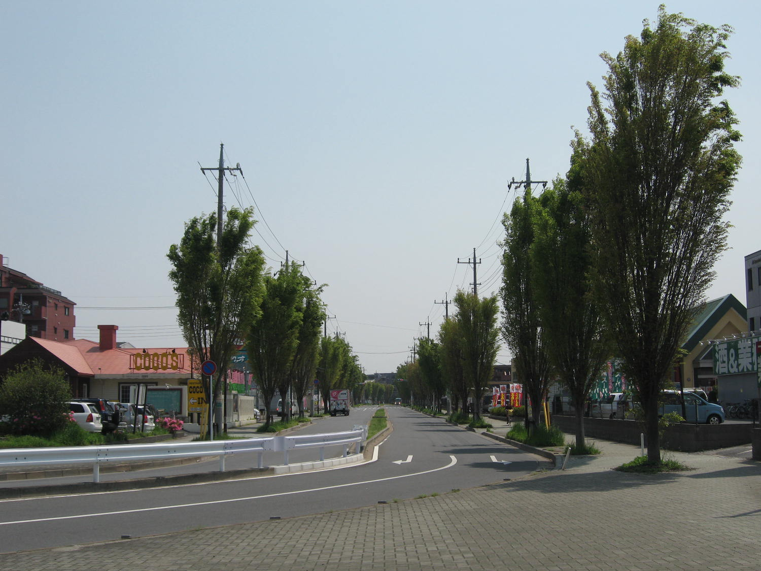 Avenue in Horinouchi, Ichikawa, Chiba, Japan.